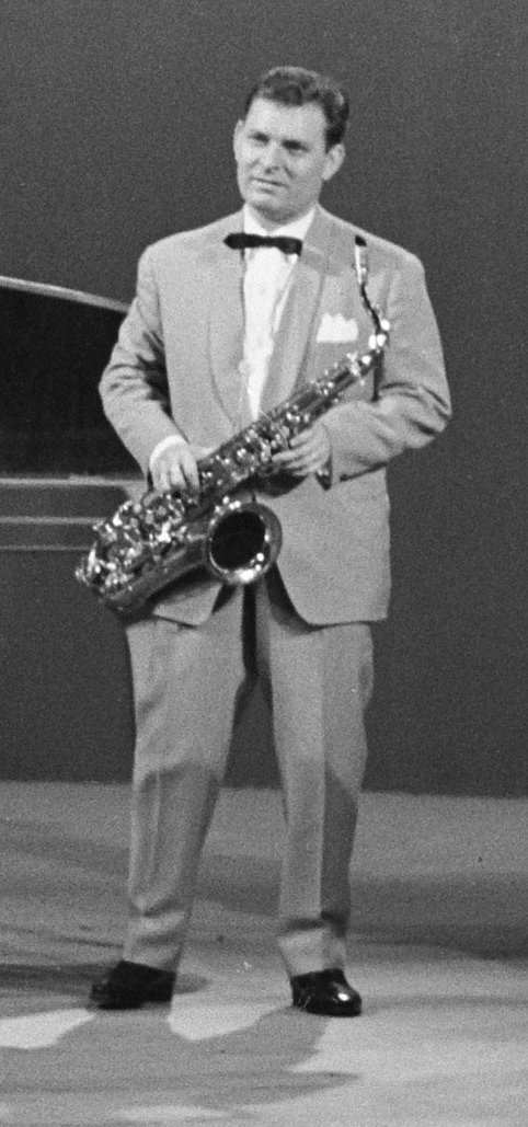 Opname van Hazy Osterwald sextet in Cinetone. Dennis Armitage.